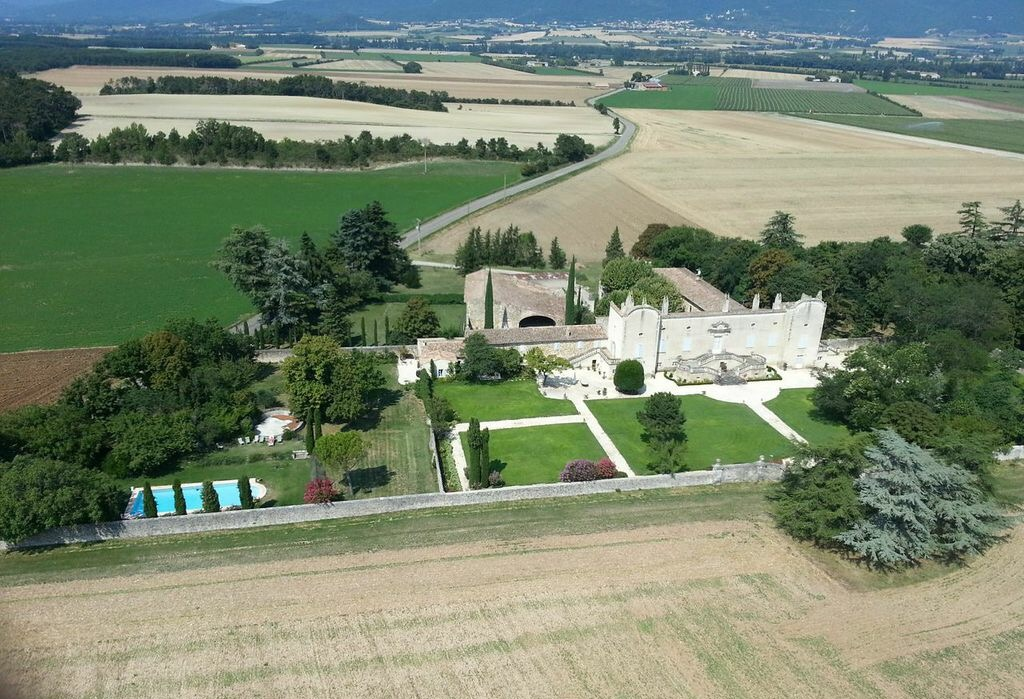 vue côté Est